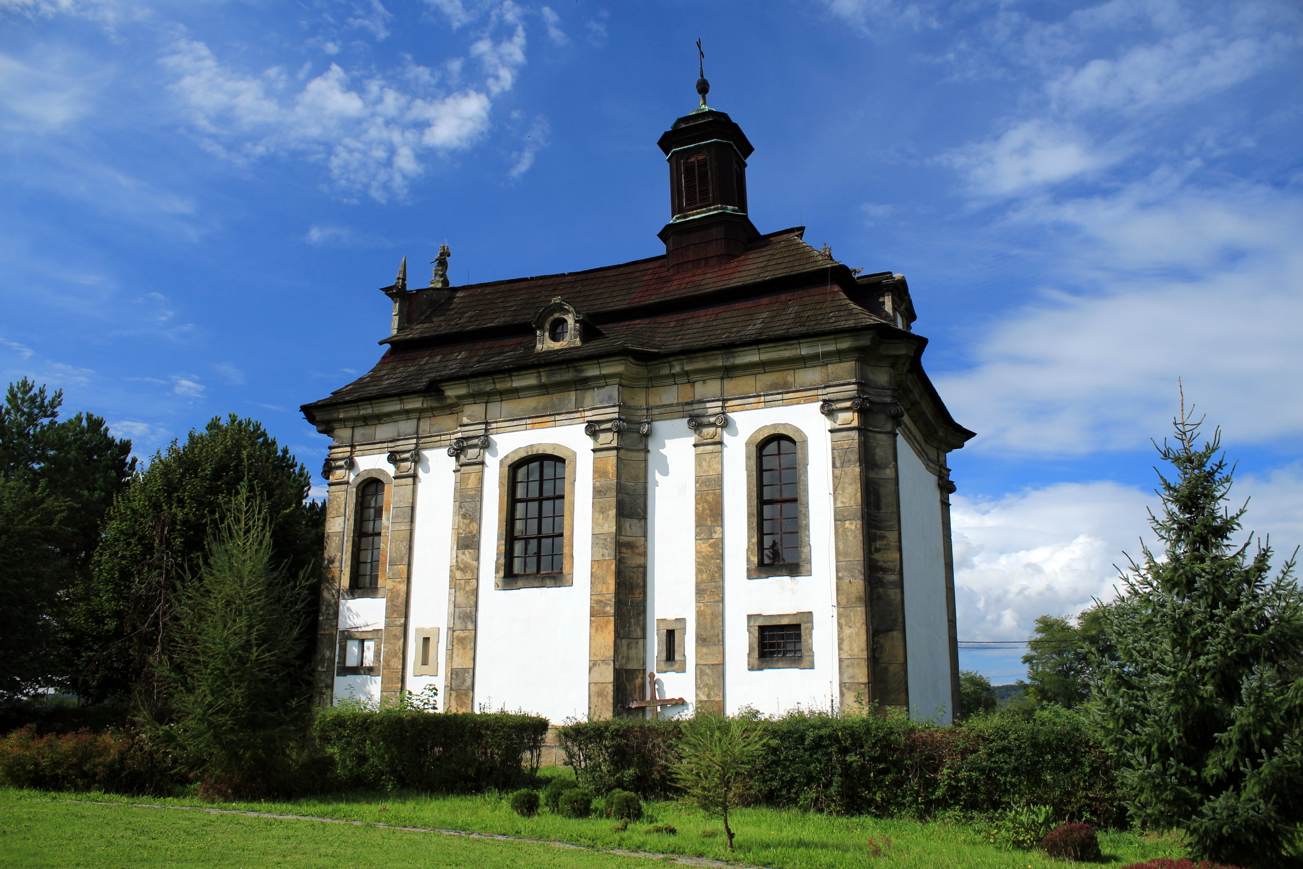 Kostelík sv. Jana Nepomuckého ve Velkém Valtinově